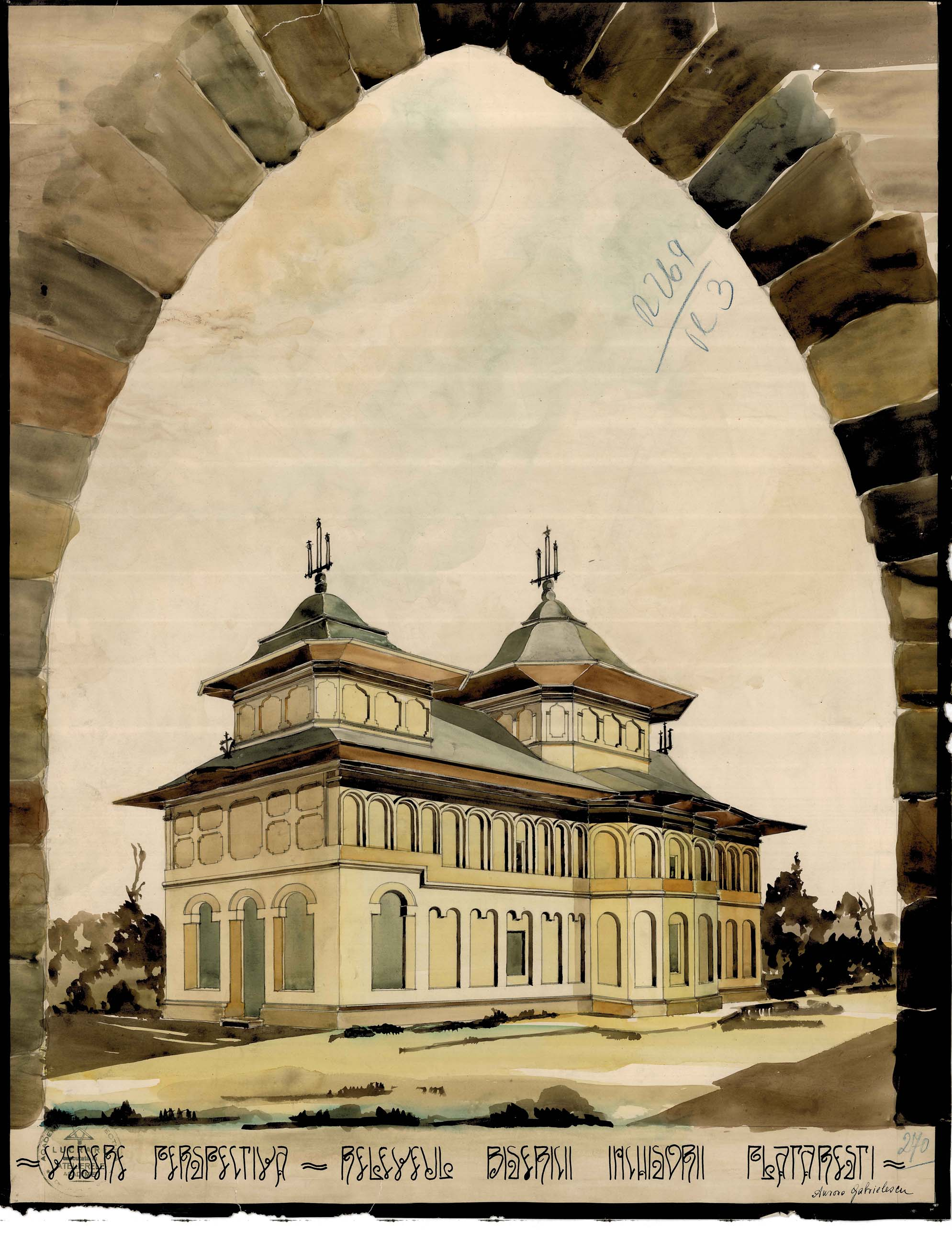 Releveu arhitectonic al Mănăstirii Plătăreşti, realizat în 1936 This work is free and may be used by anyone for any purpose. If you wish to use this content, you do not need to request permission as long as you follow any licensing requirements mentioned on this page.